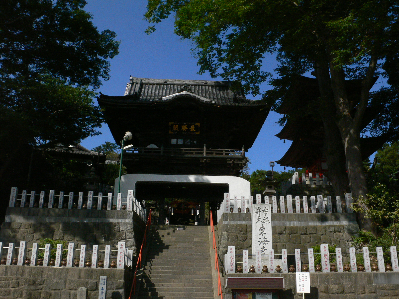 紅龍山東海寺入口にあった最勝閣。